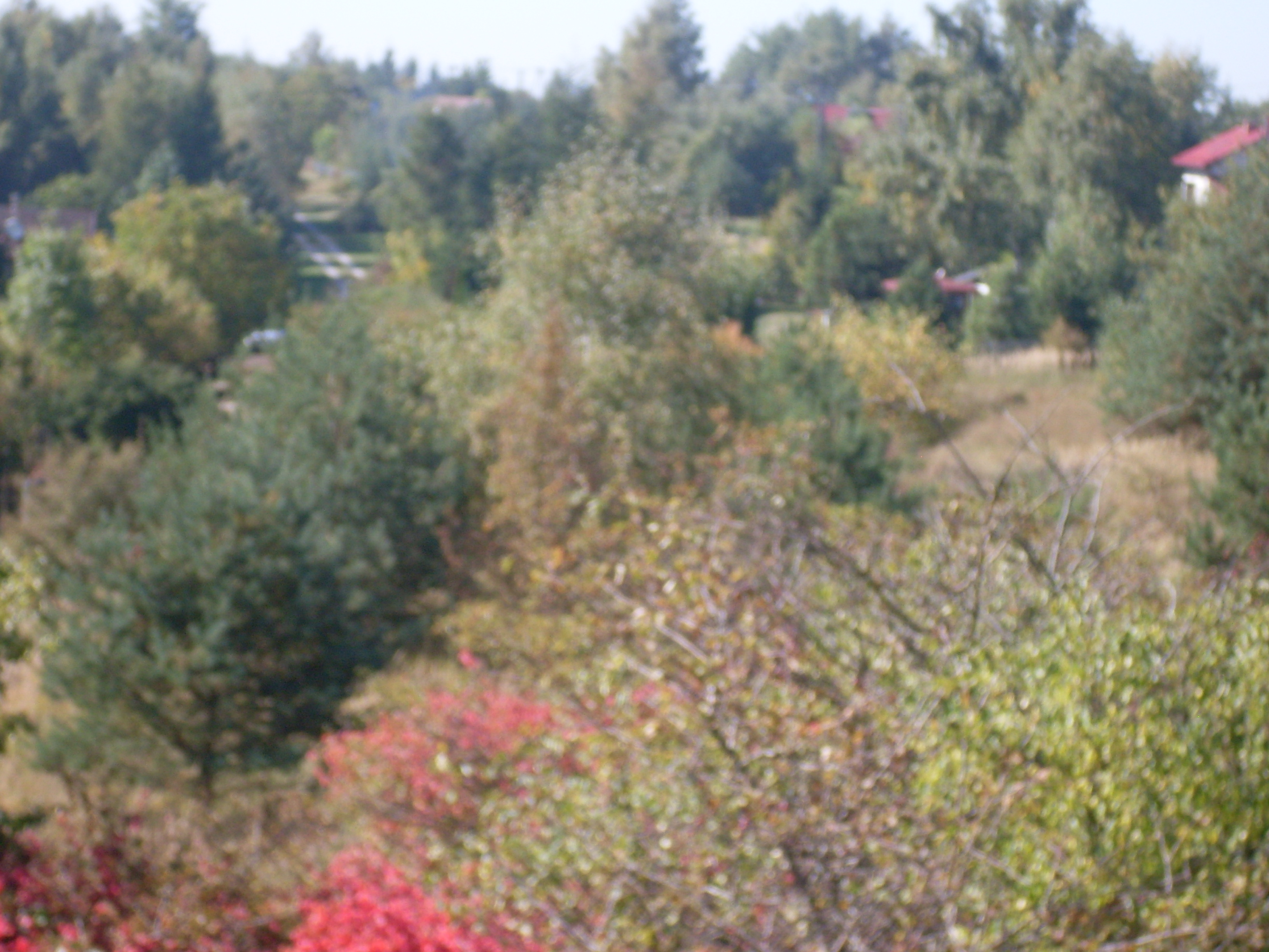 Część ogródków działkowych Enklawa w Tenczynku